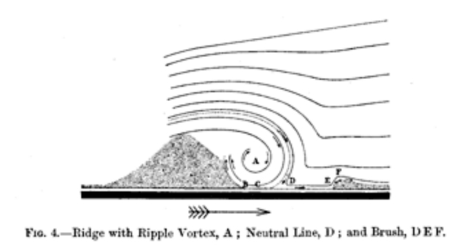 Figuur 4 uit het artikel The Origin and Growth of Ripple-mark, 1904